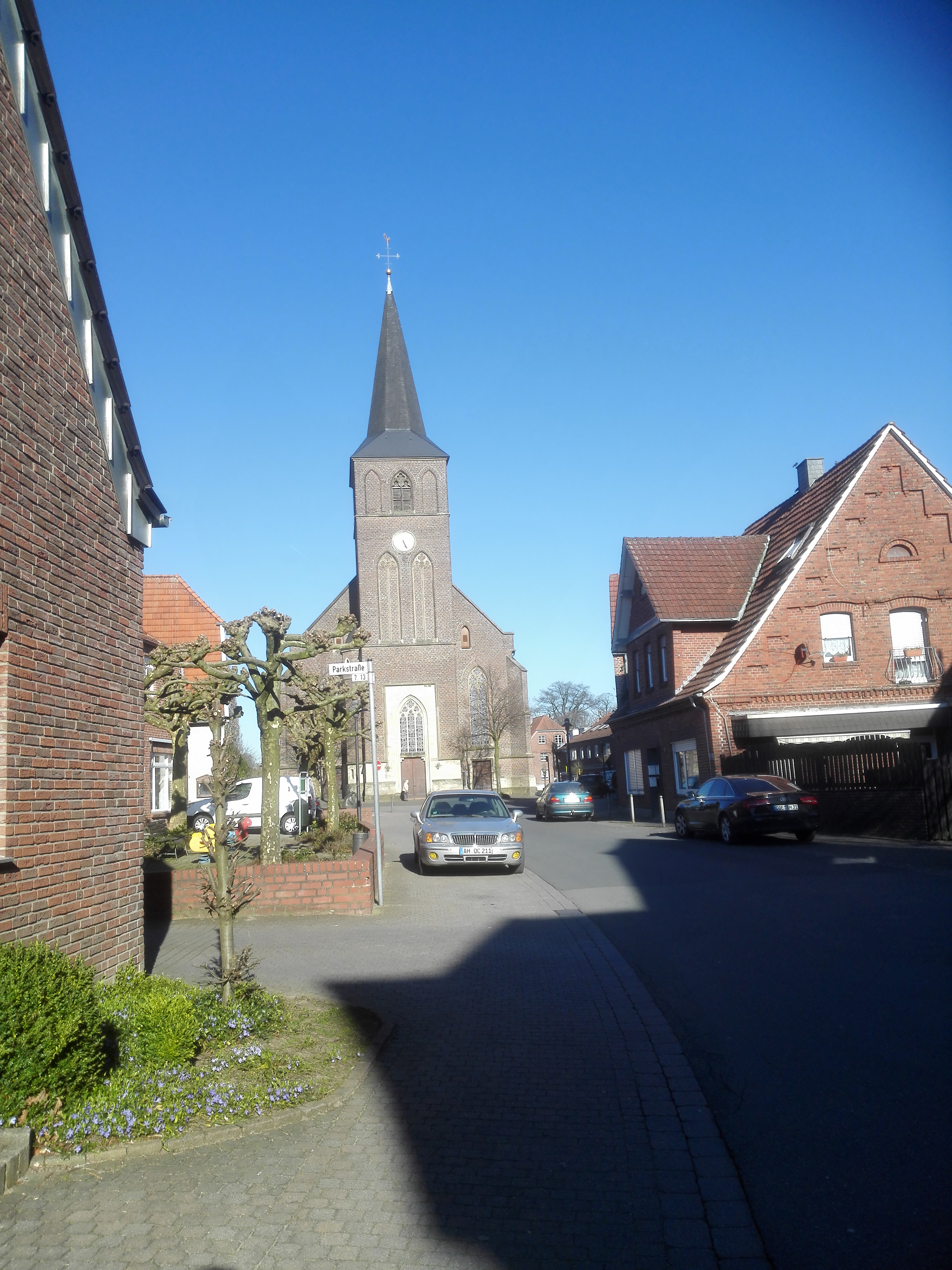 Kirche von Westen fotografiert.